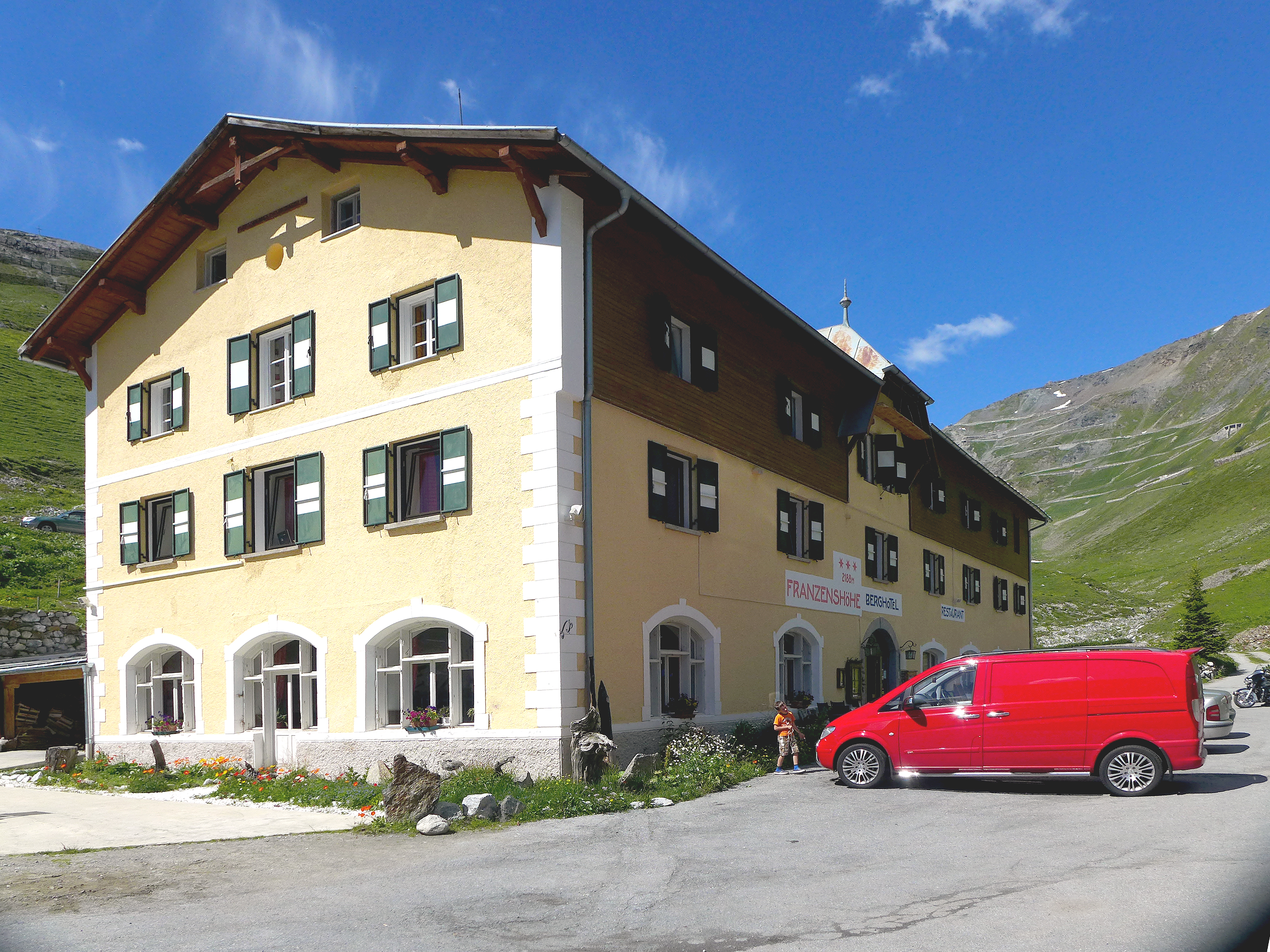 Stelvio-hágó: Franzenshöhe Berghotel, Trafoi, Olaszország (2188 m)